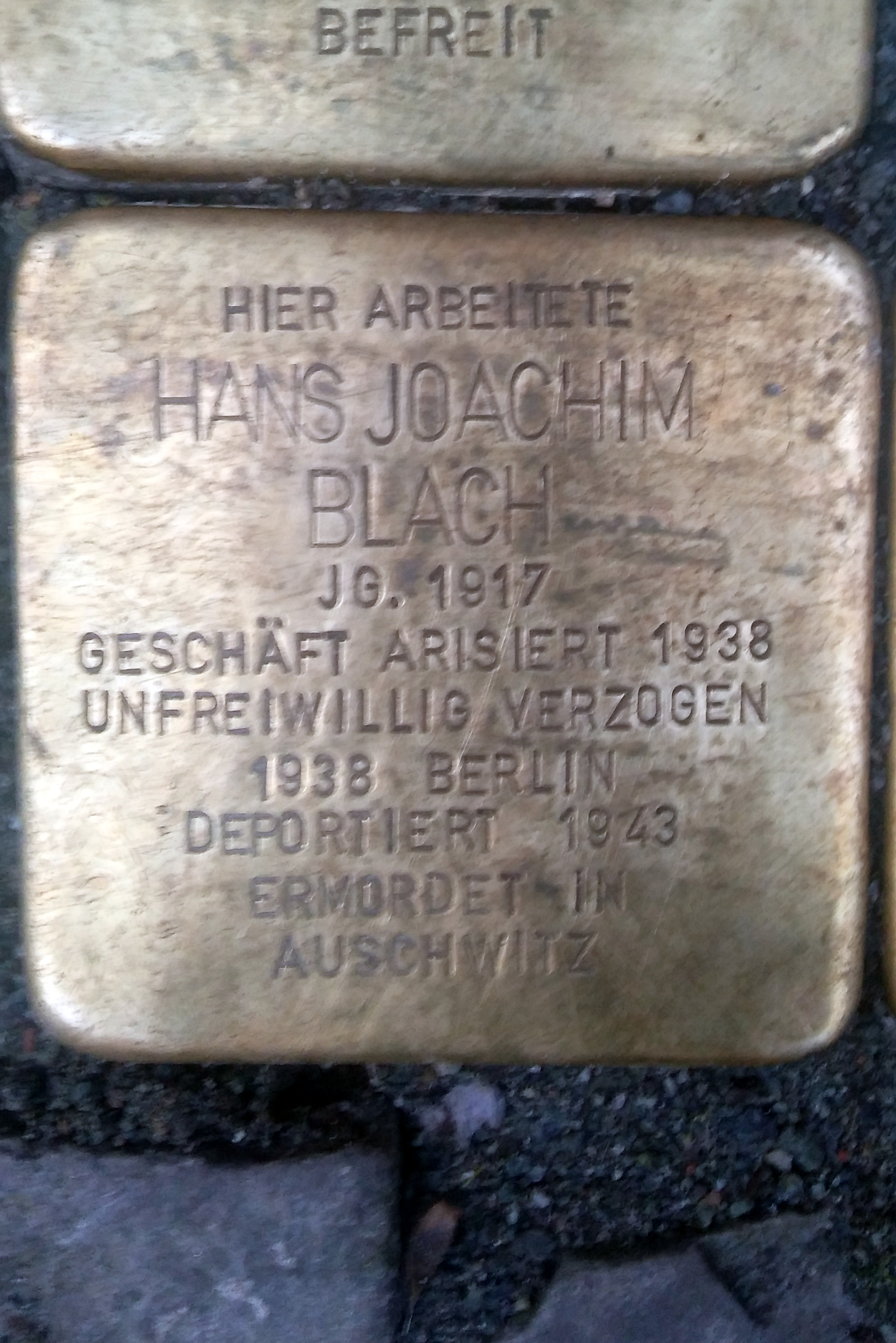 Stolperstein Hans Joachim Blach, Stralsund Hans Joachim Blach war der Sohn von Carl-Philipp Blach und Bruder von Friedrich Blach und Gerd Blach. Der Stolperstein wurde am 9. November 2017 verlegt.